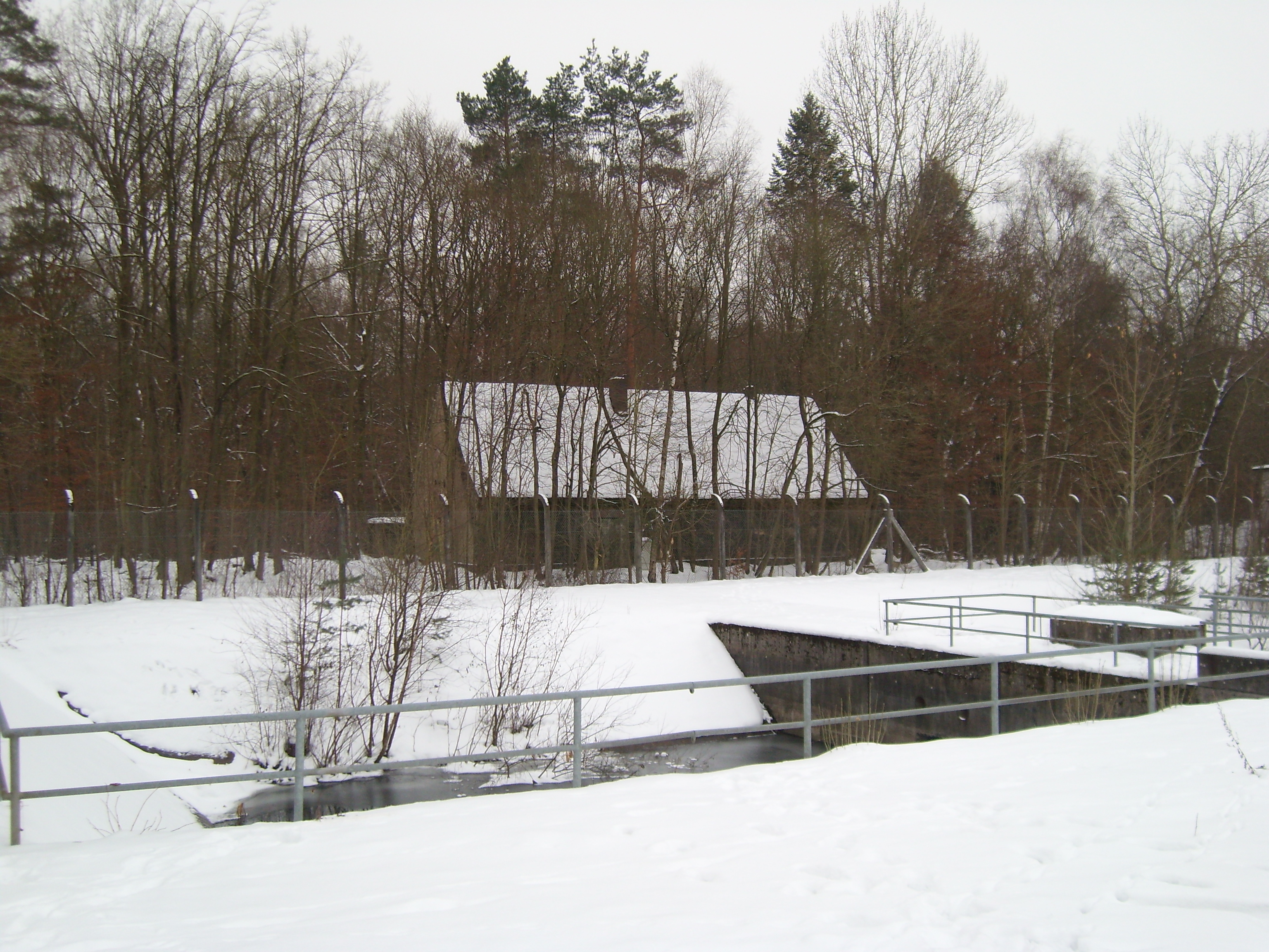 Zugangsgebäude zum Nachrichtenbunker Gisela